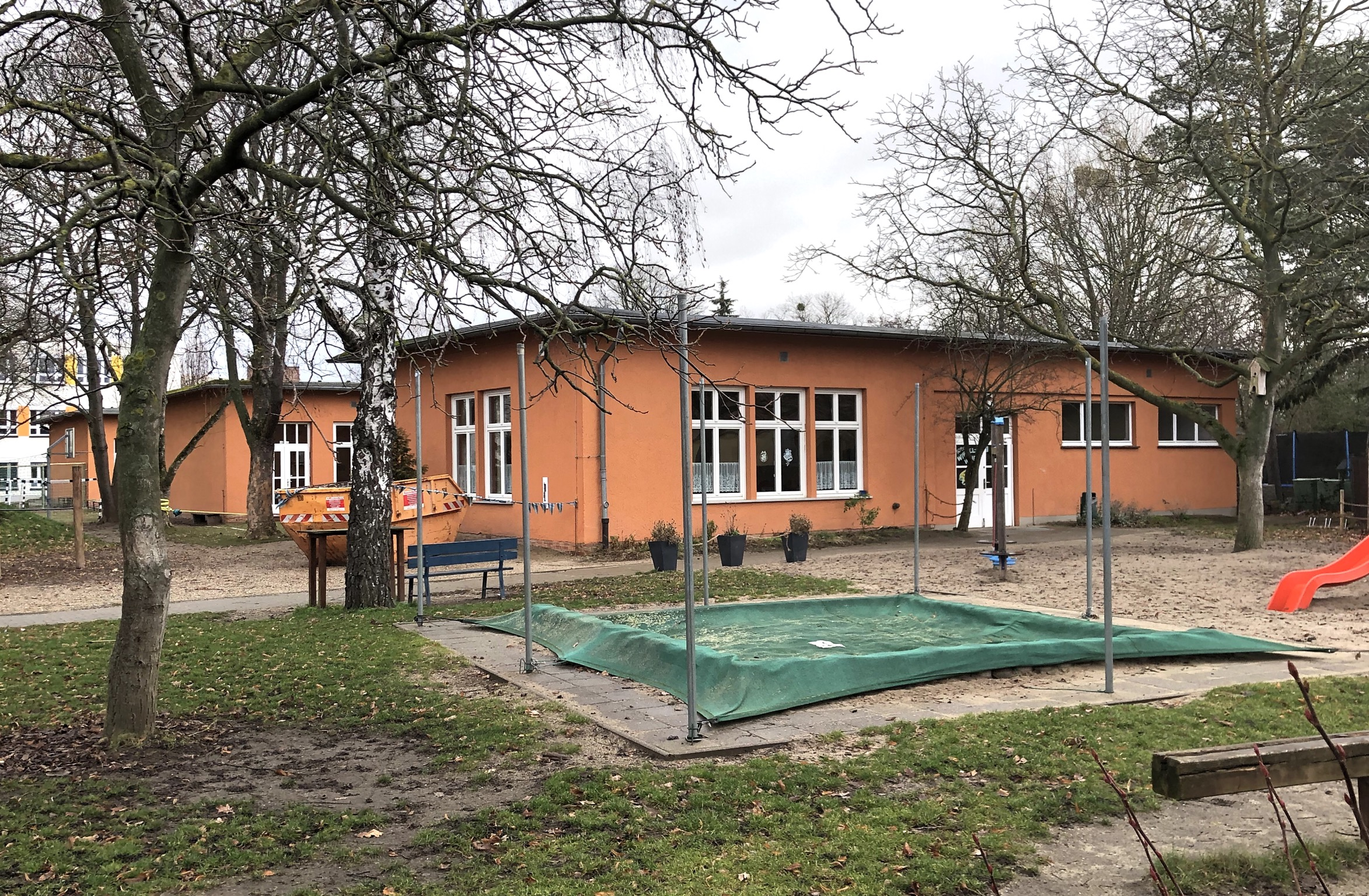 Grundschule in der Witzlebenstraße in Cracau